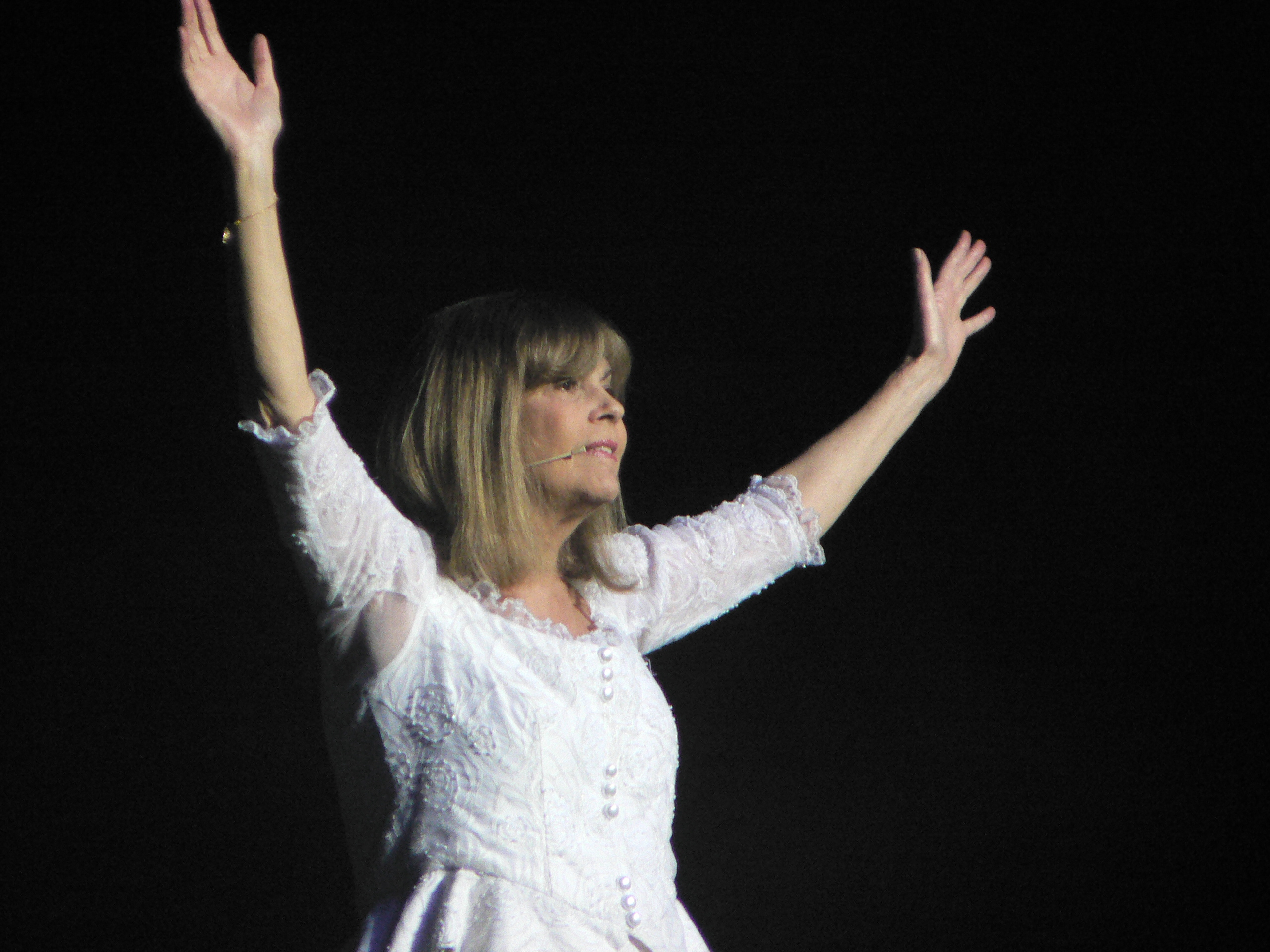 Chantal Goya au Forest National, Bruxelles le 5 décembre 2009.